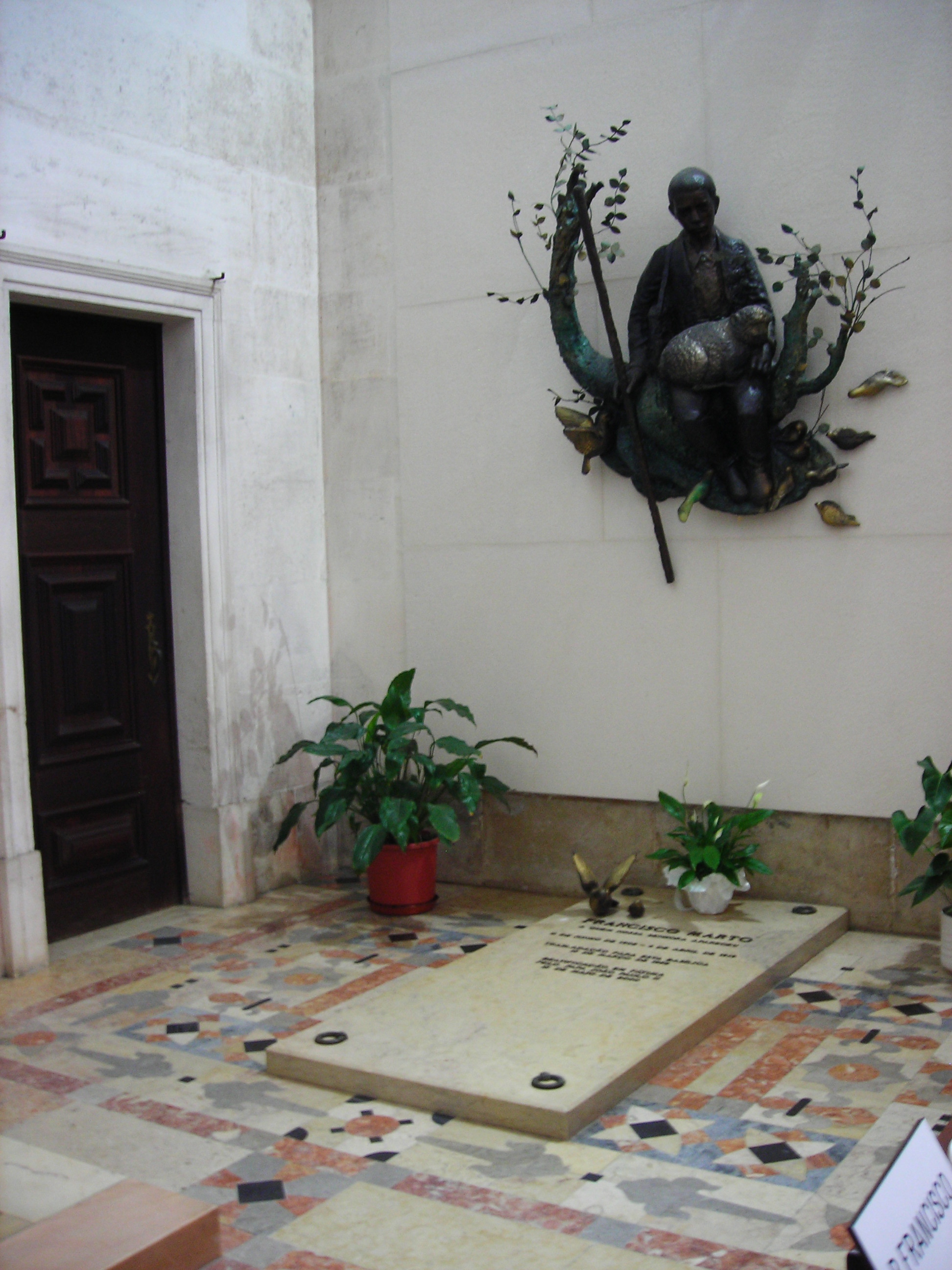 Santuário de Fátima